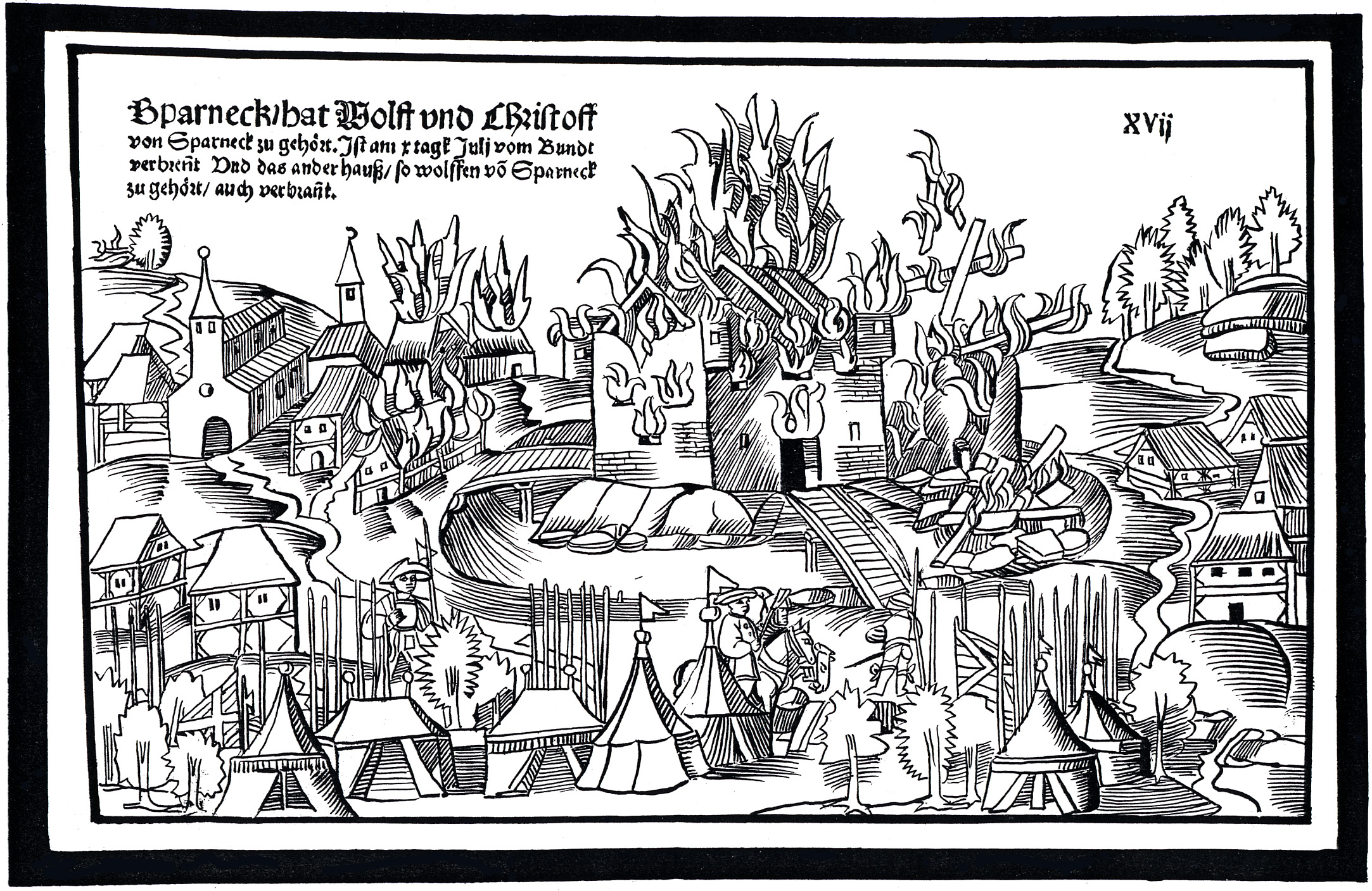 Holzschnitt von Hans Wandereisen zur Zerstörung des Adelssitzes in Sparneck durch den Schwäbischen Bund 1523